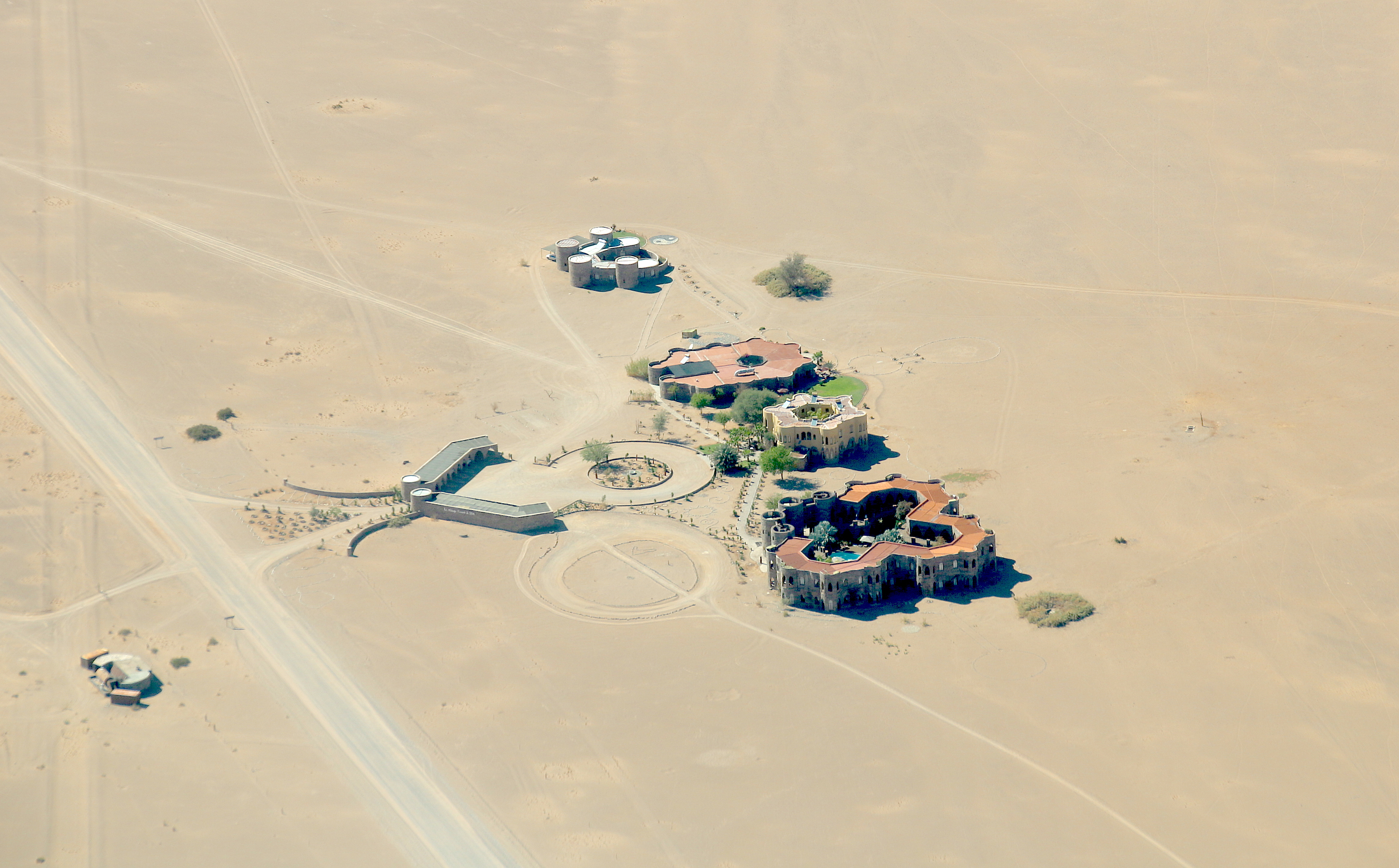 Le Mirage Lodge Sossusvlei